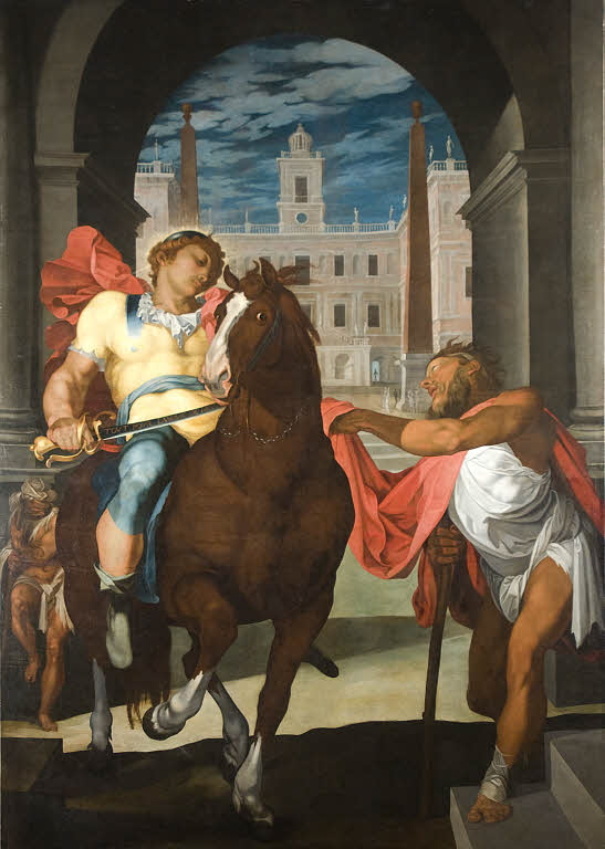 La Charité de Saint Martin, peint par Martin Fréminet, Paris, musée du Louvre